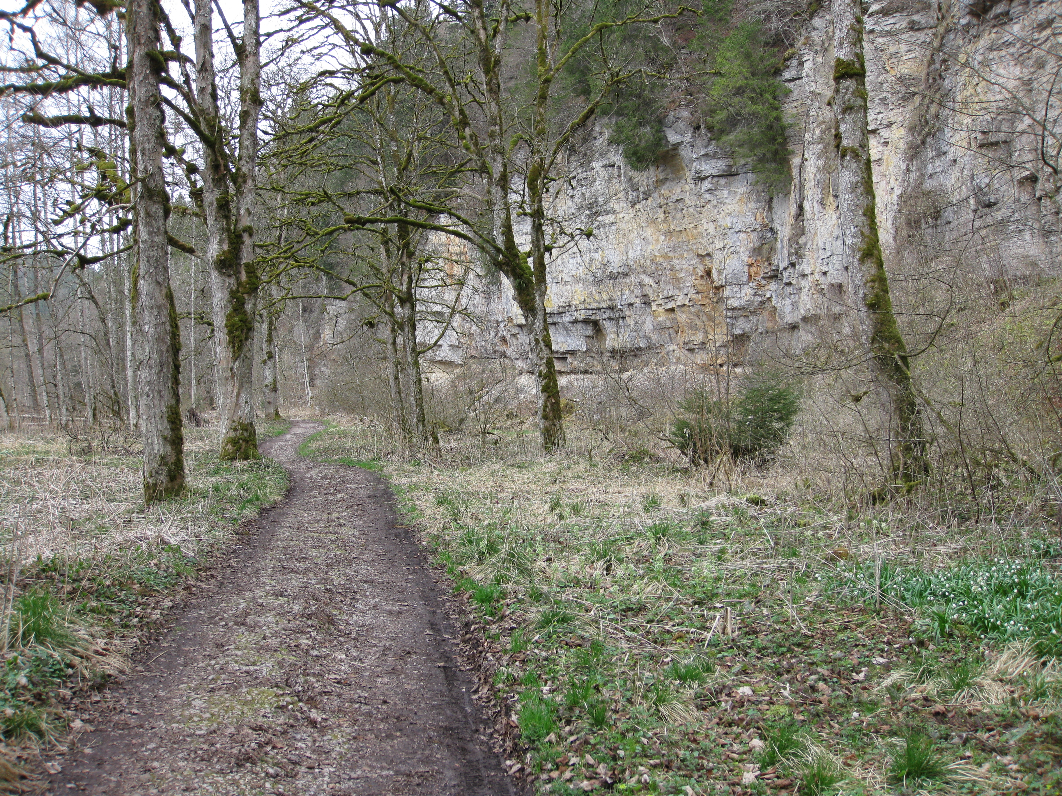 Allee beim ehemaligen Kurort Bad Boll in der Wutachschlucht.Heute Querweg Freiburg-Bodensee. Angelegt in der Blütezeit von Bad Boll. Im Volksmund Engländerallee genannt.